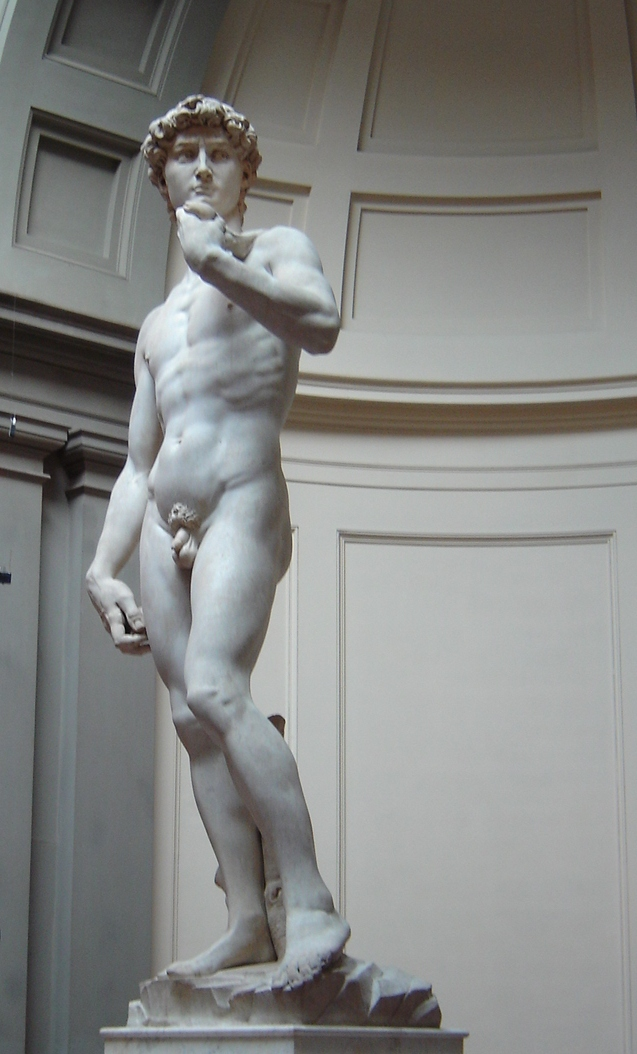 David, Michel-Ange/ Source :wikipedia en allemand, photographie personnelle d'un utilisateur, juillet 2003/ Image:David_von_Michelangelo.jpg